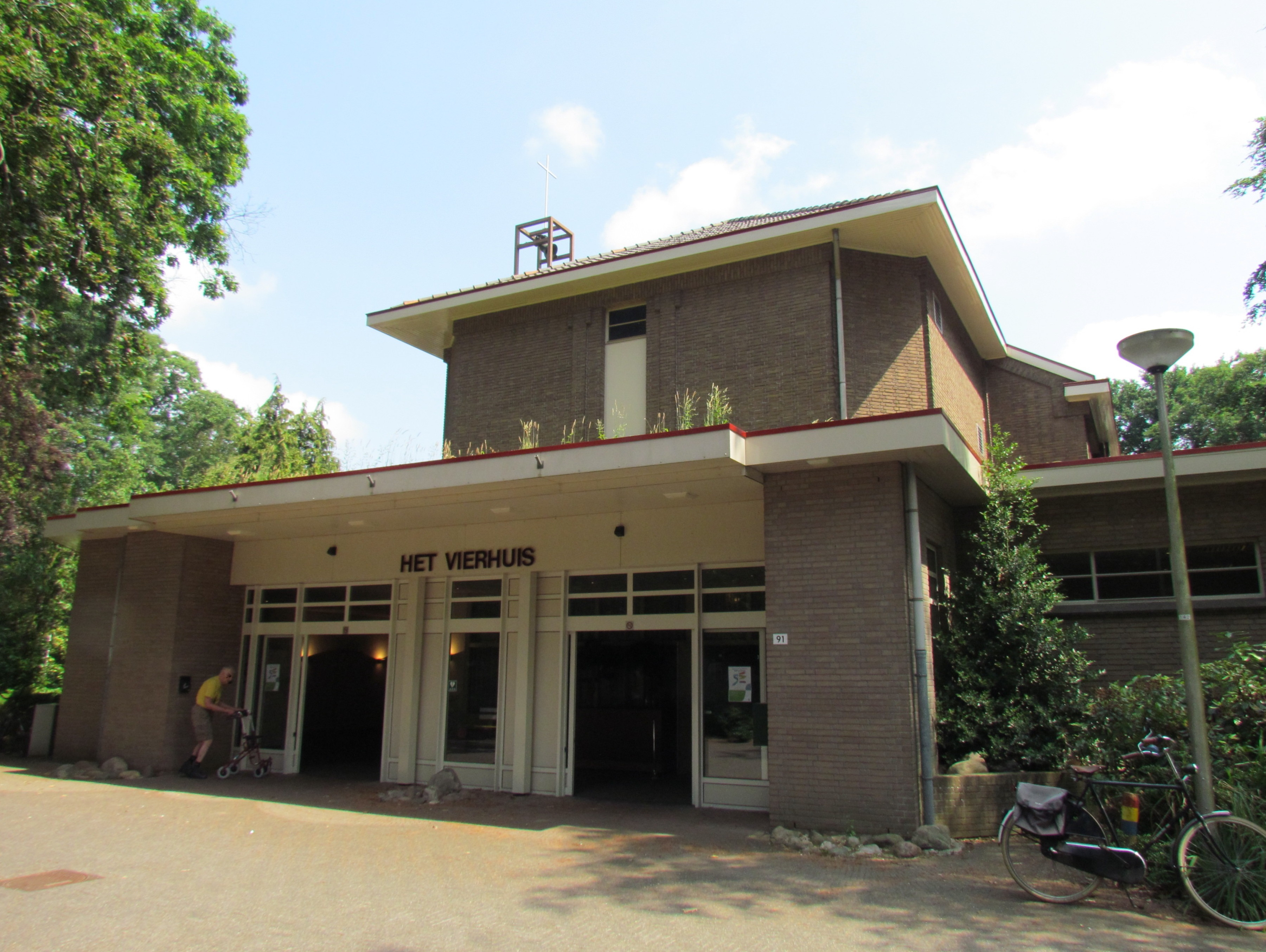 Het Apeldoornsche Bosch, Ontspanningsgebouw (thans het 'Vierhuis')